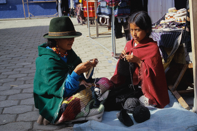 Imagen de una mujer salasaca enseñando las tecnicas de tejido a su hija en el mercado artesanal del pueblo